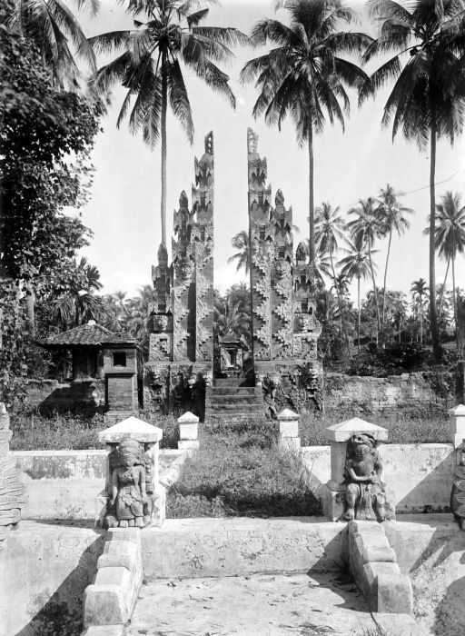 Negatief. Gespleten poort van de Pura Taman bij Boeboenan